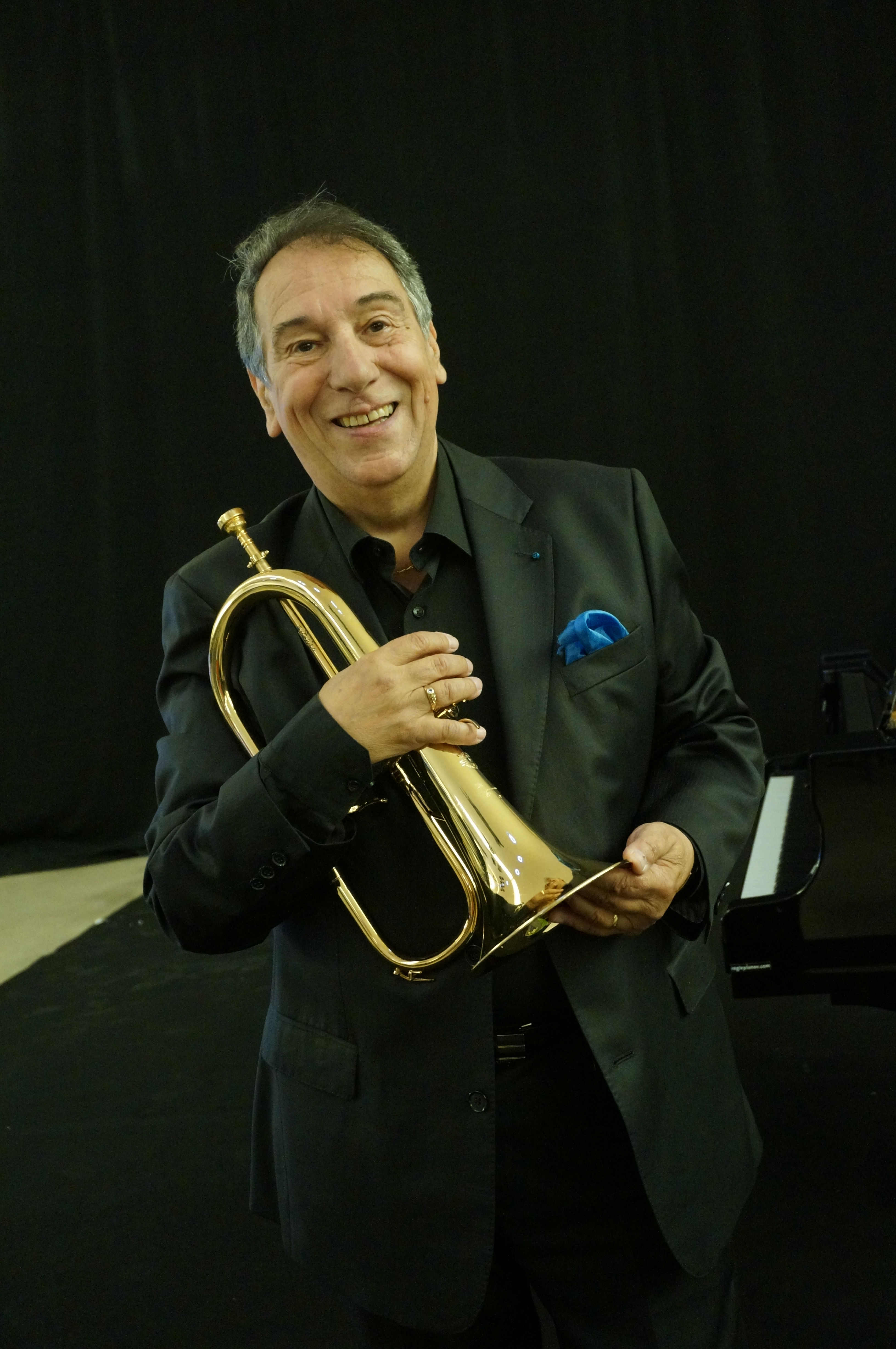 Guy Touvron.